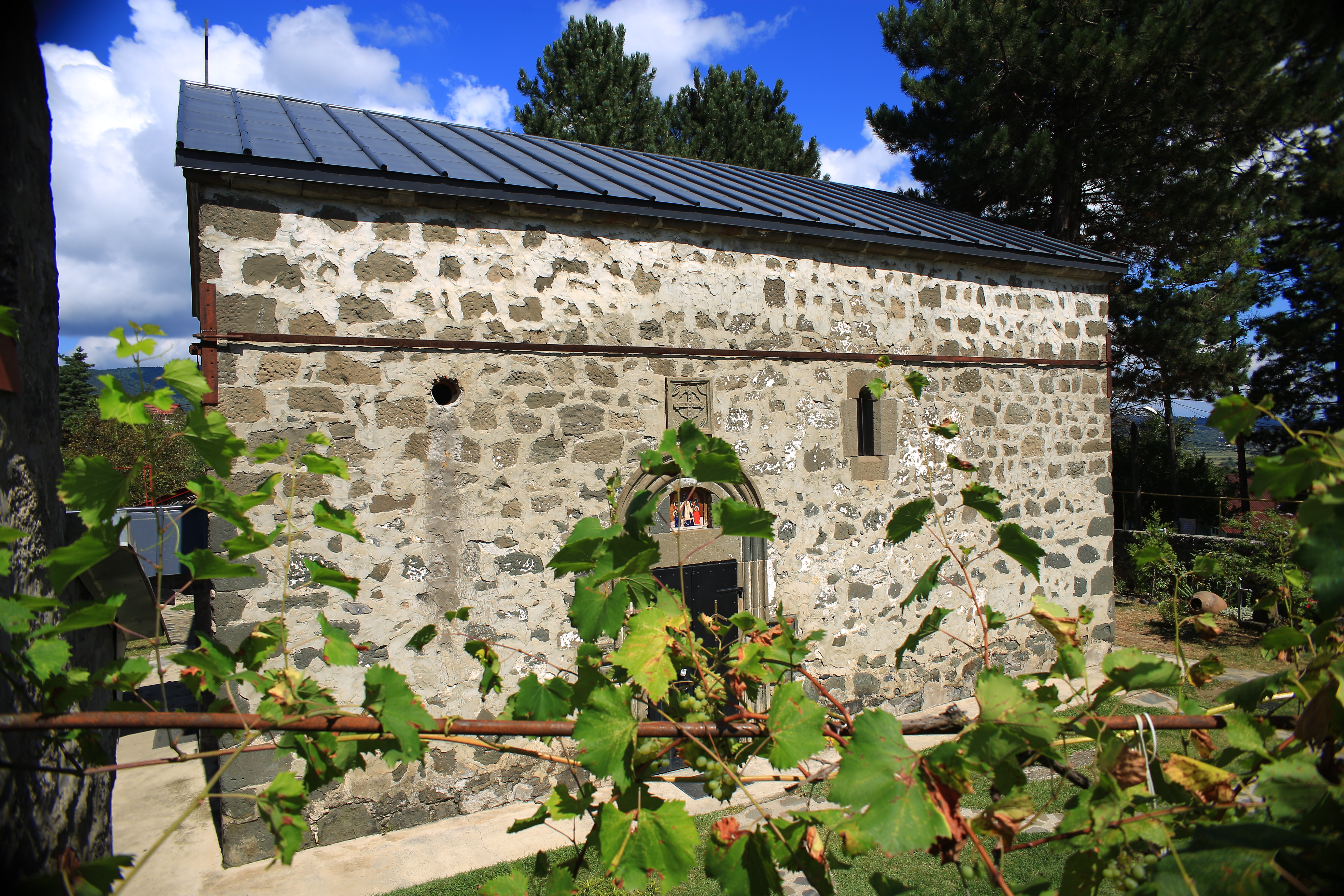 ქვიშხეთის აღდგომის ეკლესია